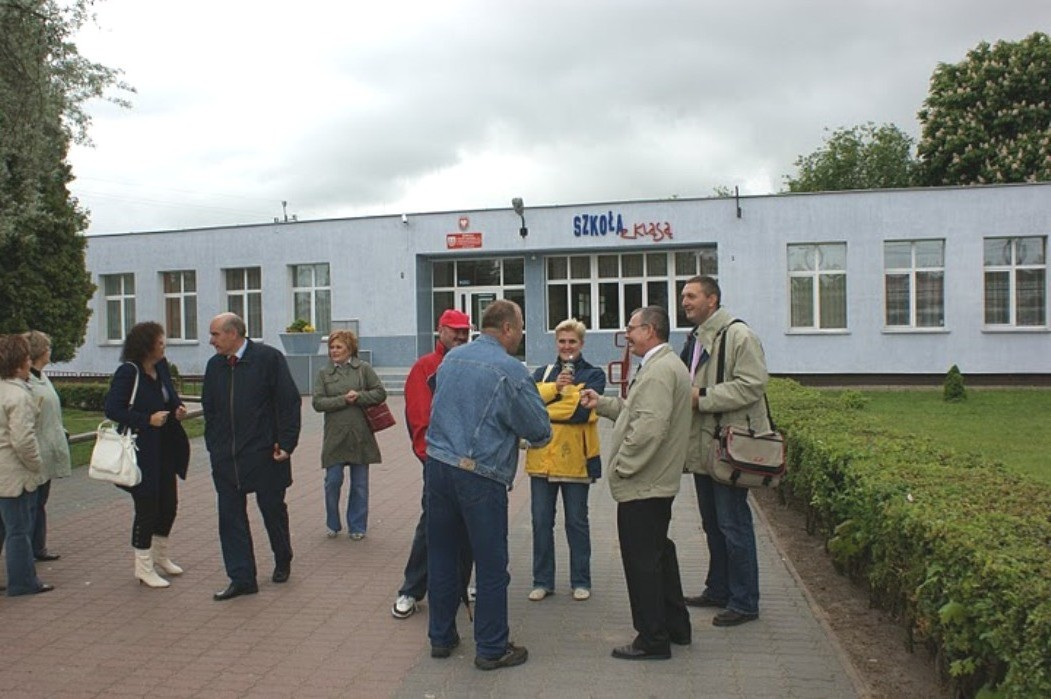 Przasnysz. Absolwenci Szkoły Podstawowej nr 1